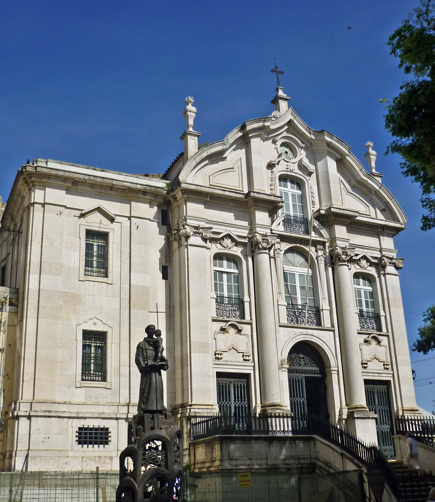 Igreja da Santo António da Sé (Antoniuskirche), ehem. Geburtshaus des Hl. Antonius von Padua (1195-1231) in Lissabon